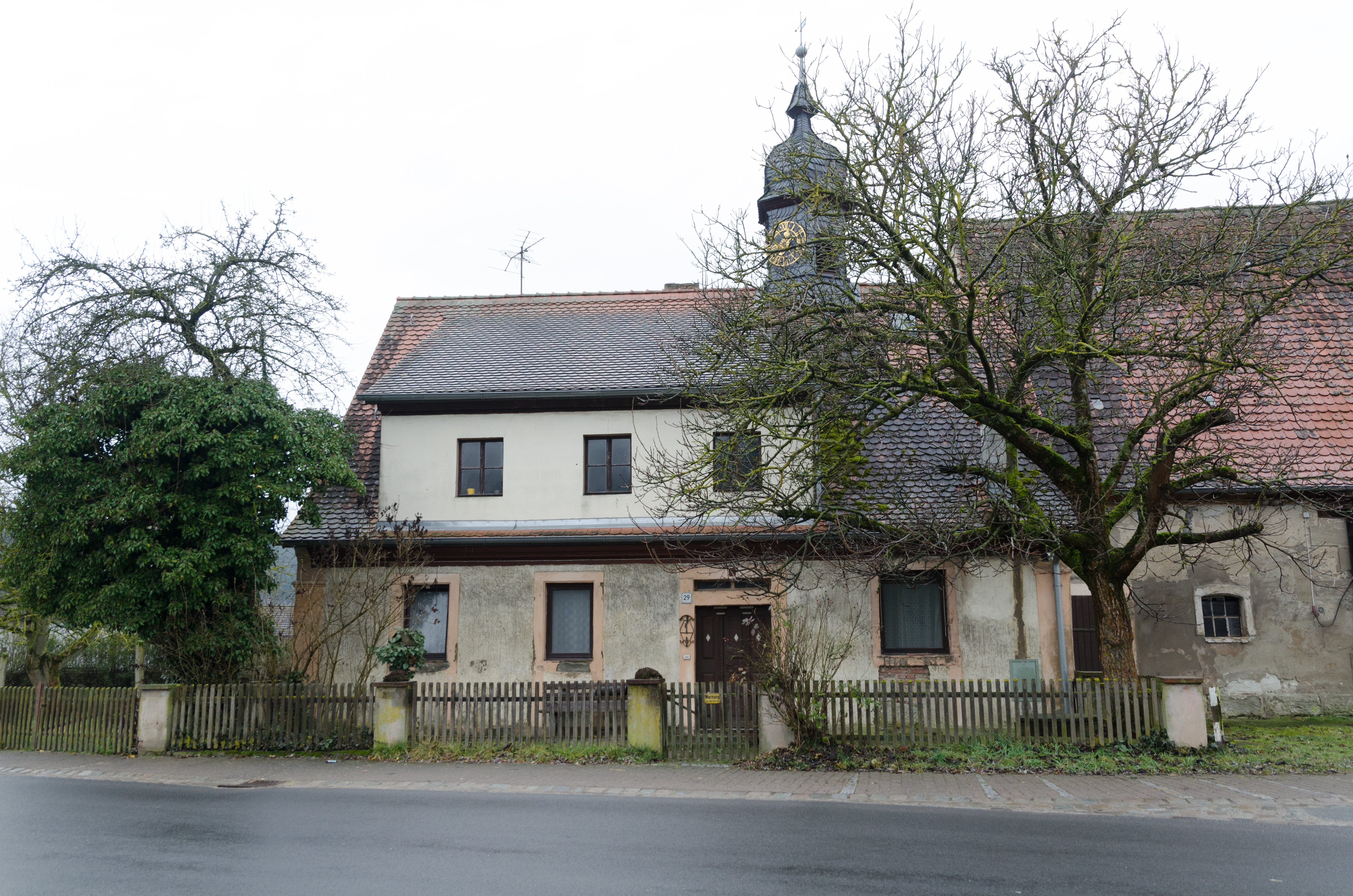 Lonnerstadt, Ailsbach 29